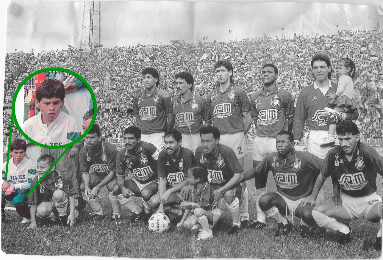 De niño Mao Molina era recoge bolas del equipo de sus amores